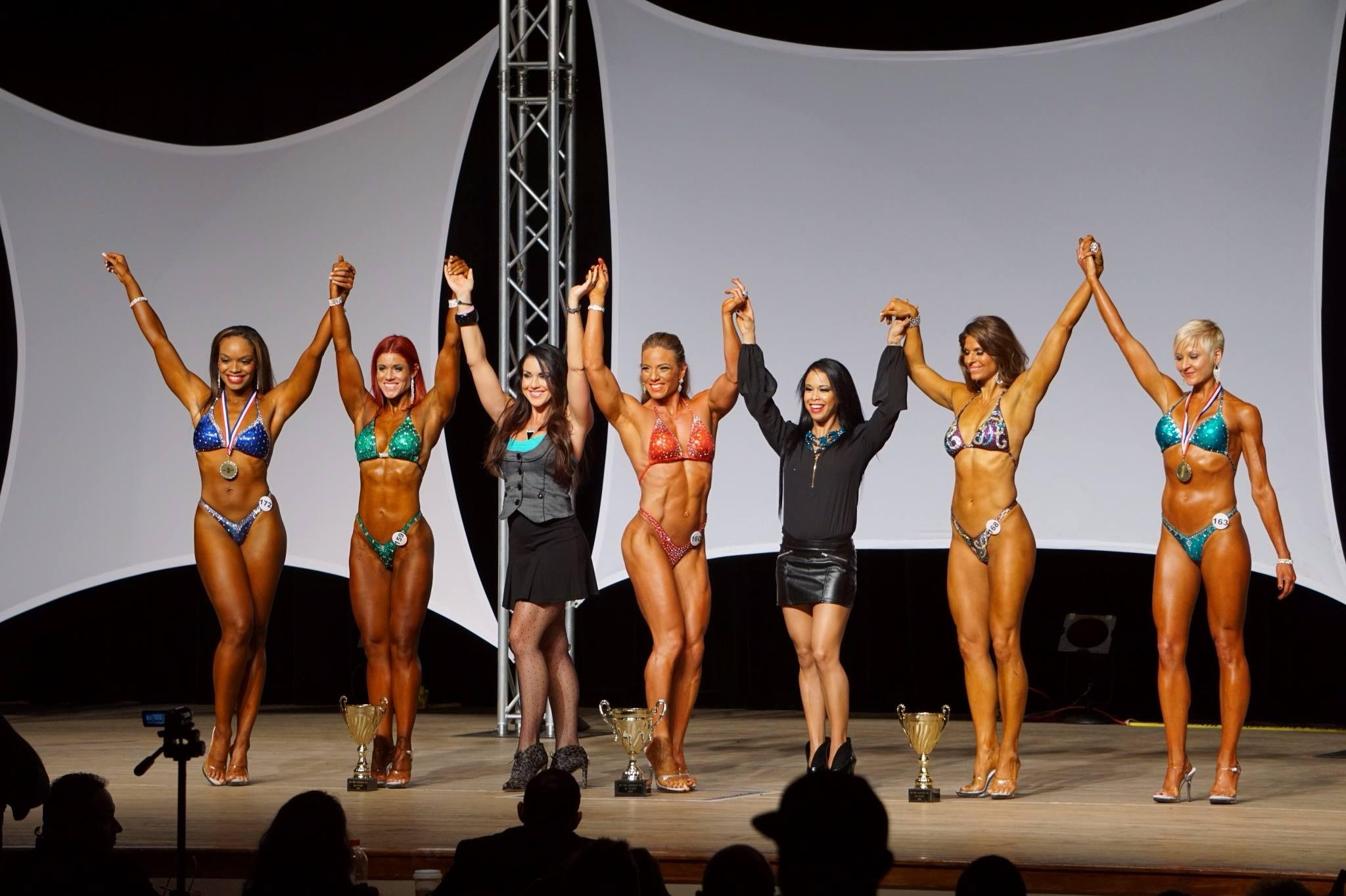 זכייה במקום הראשון בפלורידה